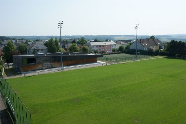 Stade Albert Kongs.